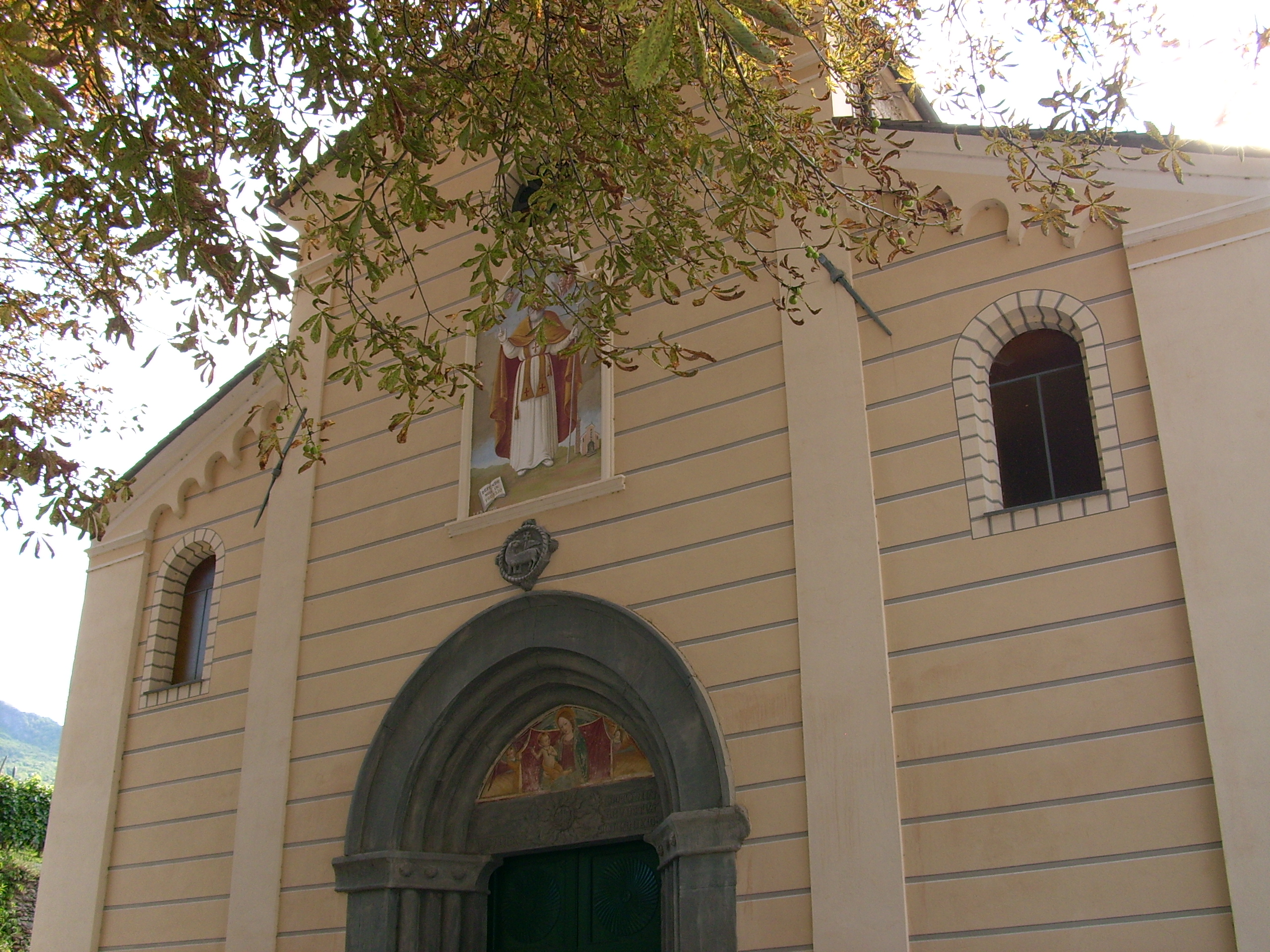 Chiesa di san Dalmazio di Pornassio, Liguria, Italia